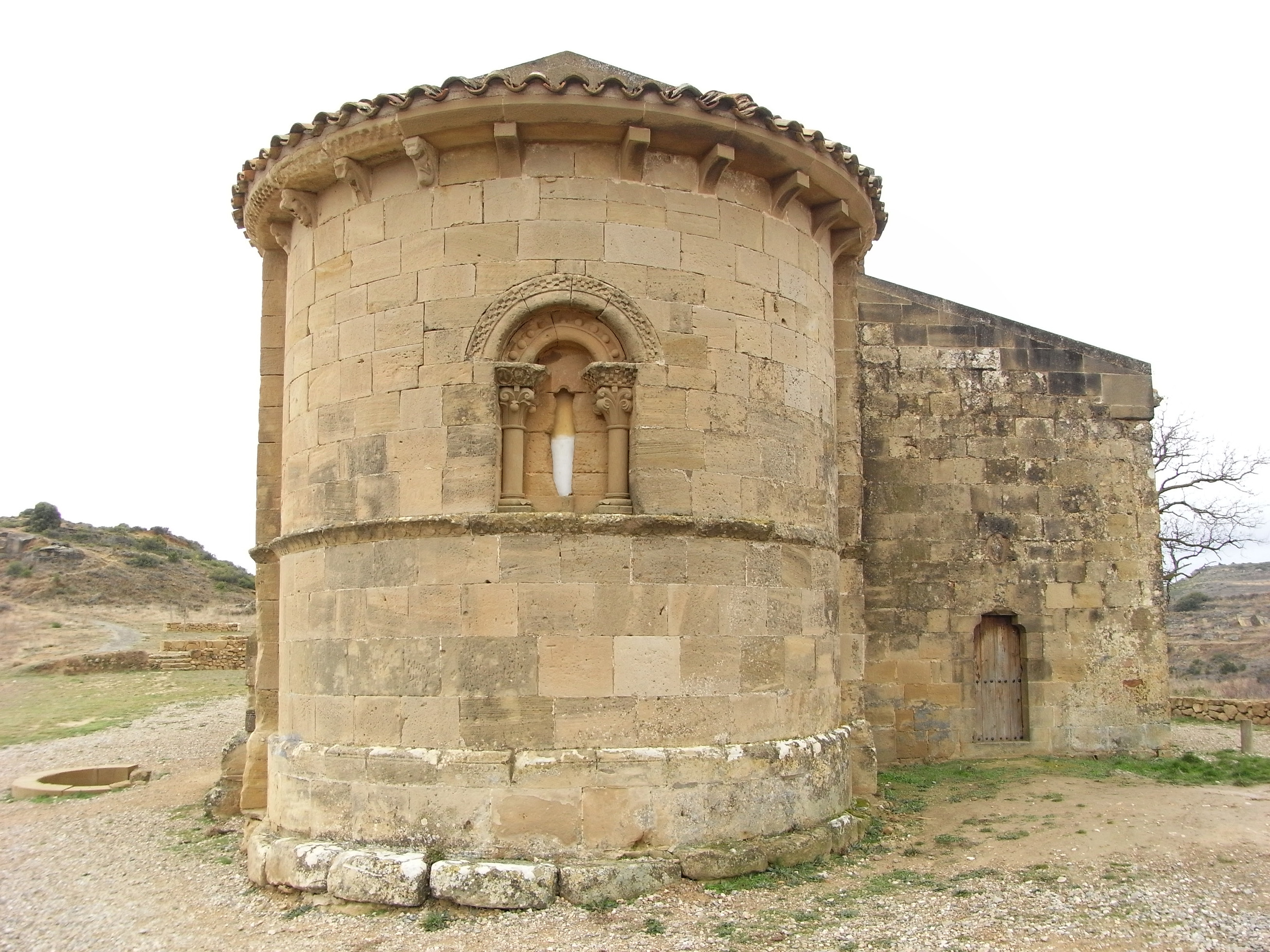 Ábside de la ermita de Santa María de La Piscina. La Rioja (España)